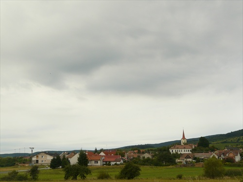 panorama dediny Dubova (okr. PK)